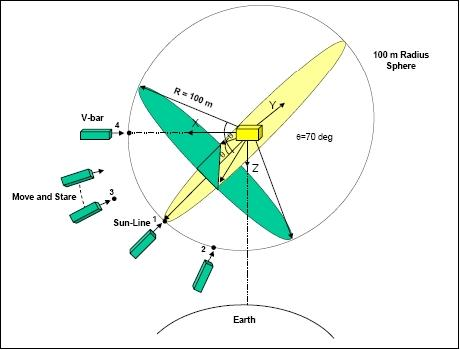 XSS-10 mission diagram